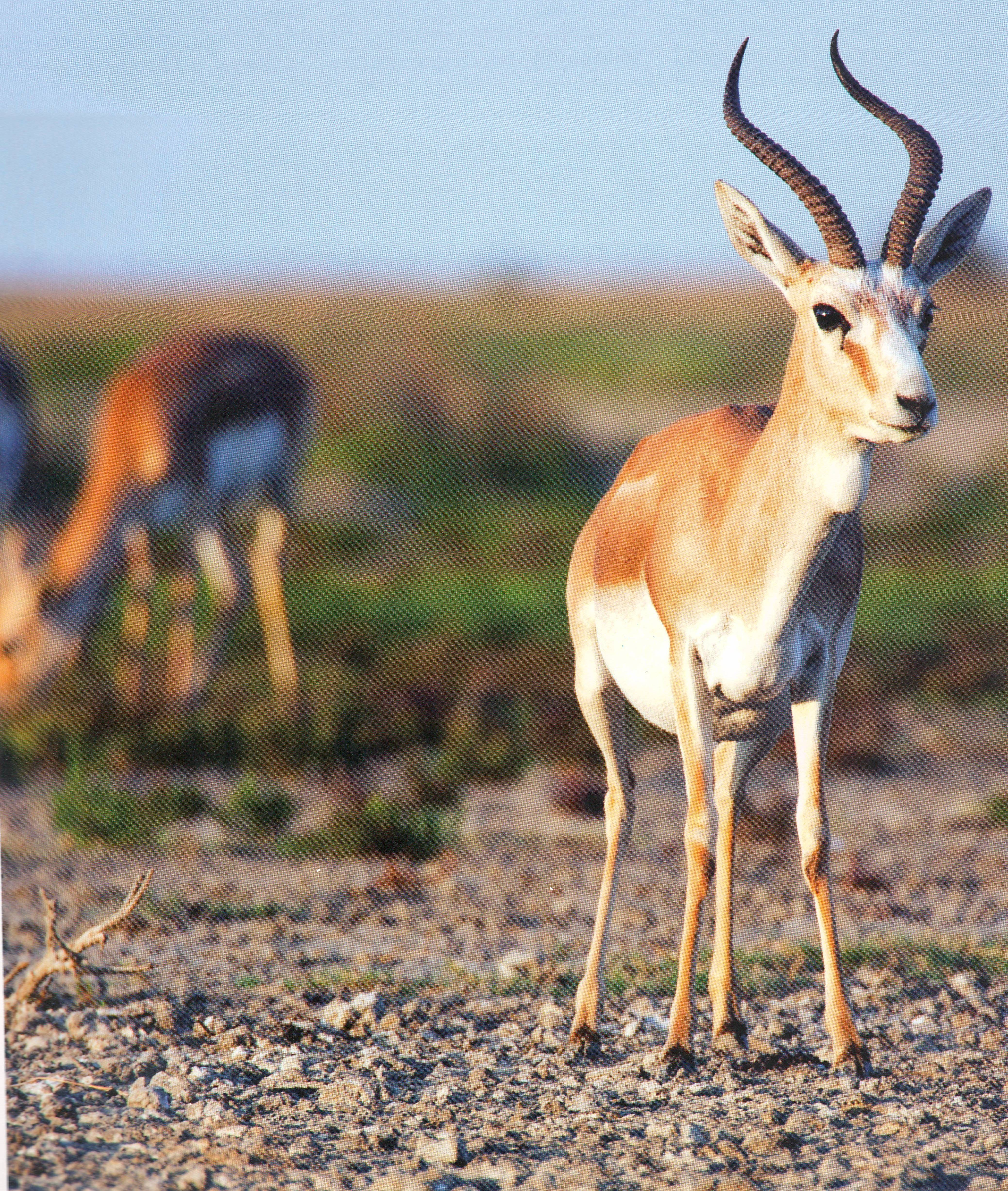 Salyan Ceyran